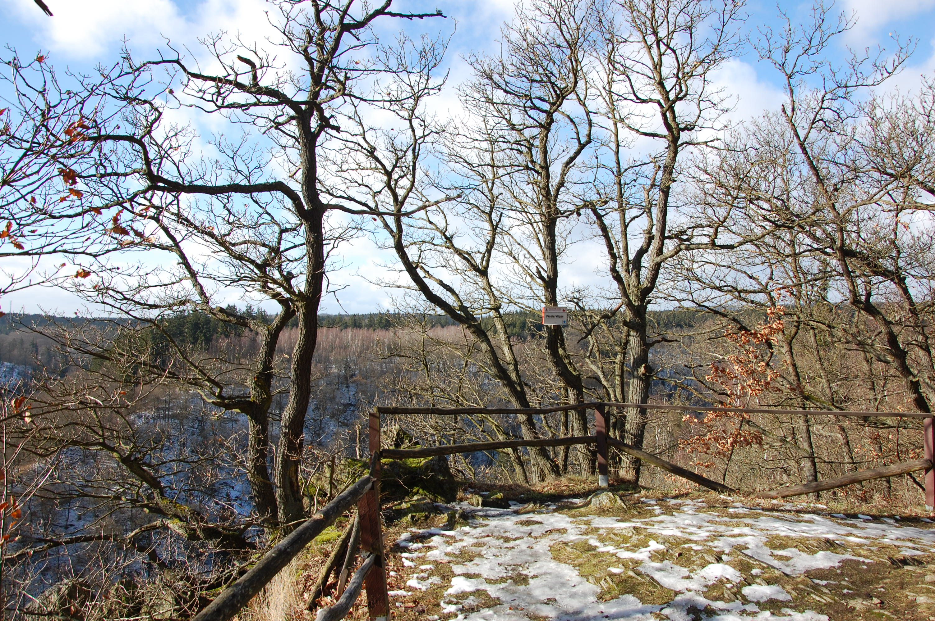 Blick von der Pionierklippe an der Selke